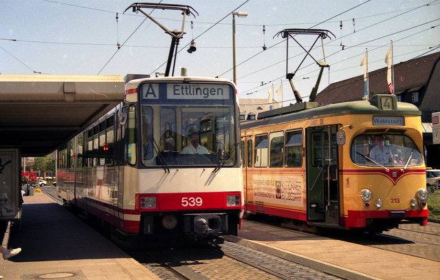 Trams outside Karlsruhe Hauptbahnhof